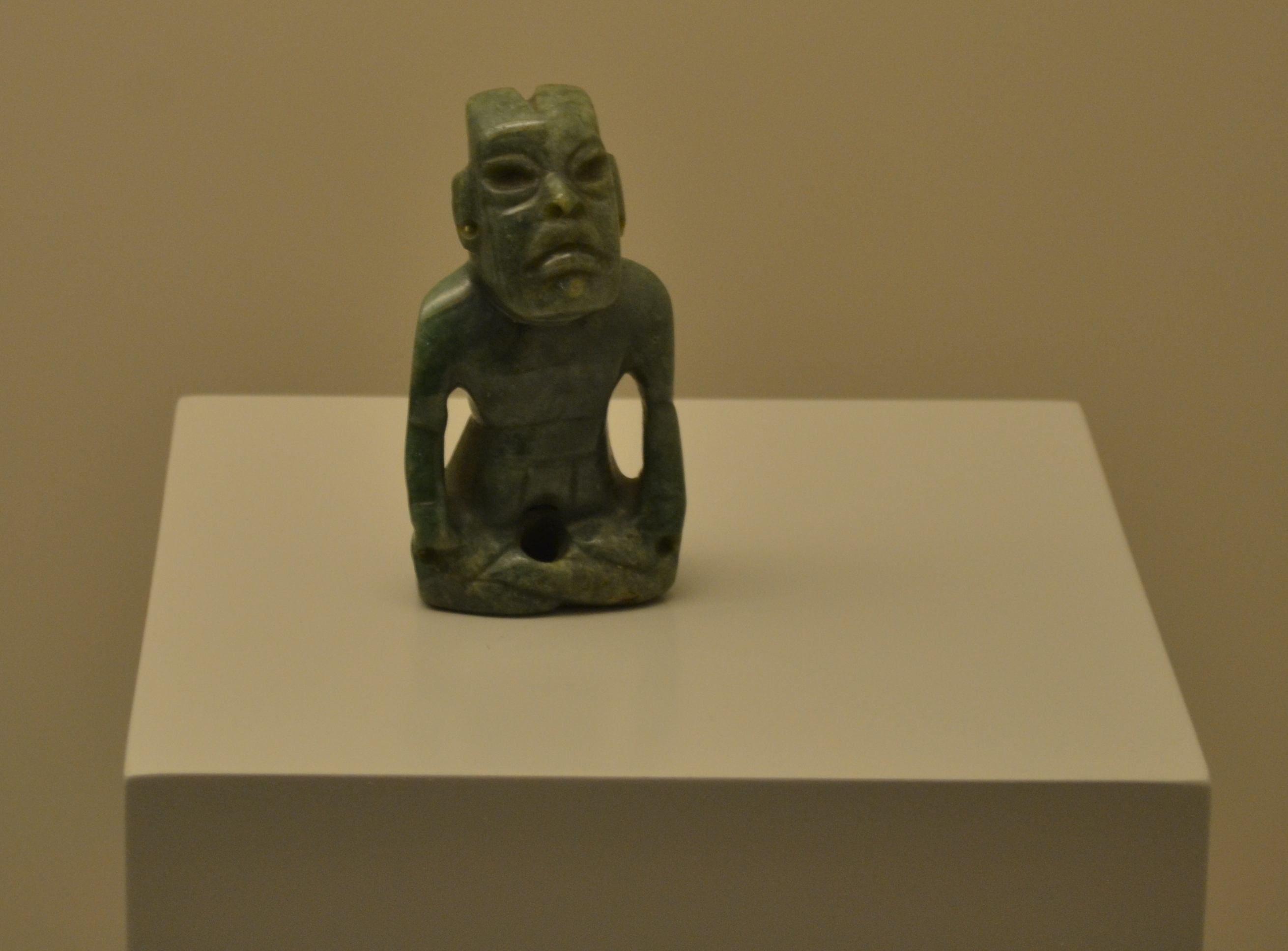 Seated ceramic Olmec figurine, depicting Tlaloc, god of rain, Middle Preclassic period (1200-400 BC), Gulf coast of Mexico. Museum of the Americas, Madrid. Inv. number 3175.